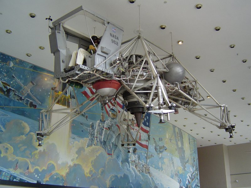 LLTV #2 в Космическом центре им. Л. Джонсона